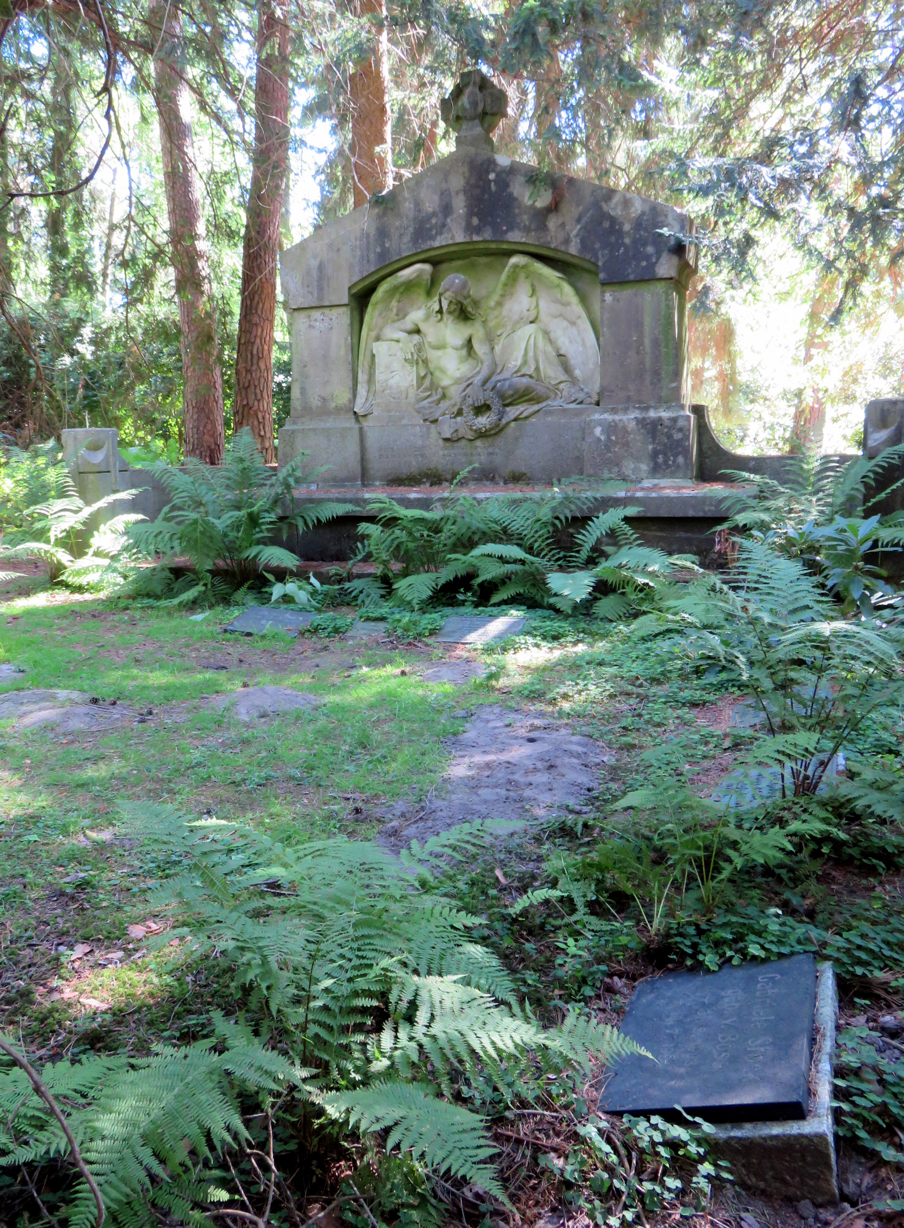 6 m breite und 3 m hohe Grabwand für Mitglieder der deutschen von Bose-Familie auf dem Hamburger Friedhof Ohlsdorf, Planquadrat P 25, 1-16 (nördlich Wasserturm an der Cordesallee). Die Signatur am Rand rechts unten „Hartmann = MCLean Dresden„06“ steht für den deutschen Bildhauer Hans Hartmann-McLean .Der untere Kissenstein am rechten Rand erinnert an die deutsche Kunstmalerin Gabriele Stock-Schmilinksky, geborene von Bose (Tochter von Charles von Bose – siehe den dritten Kissenstein auf dem Boden vor dem Grabmal).